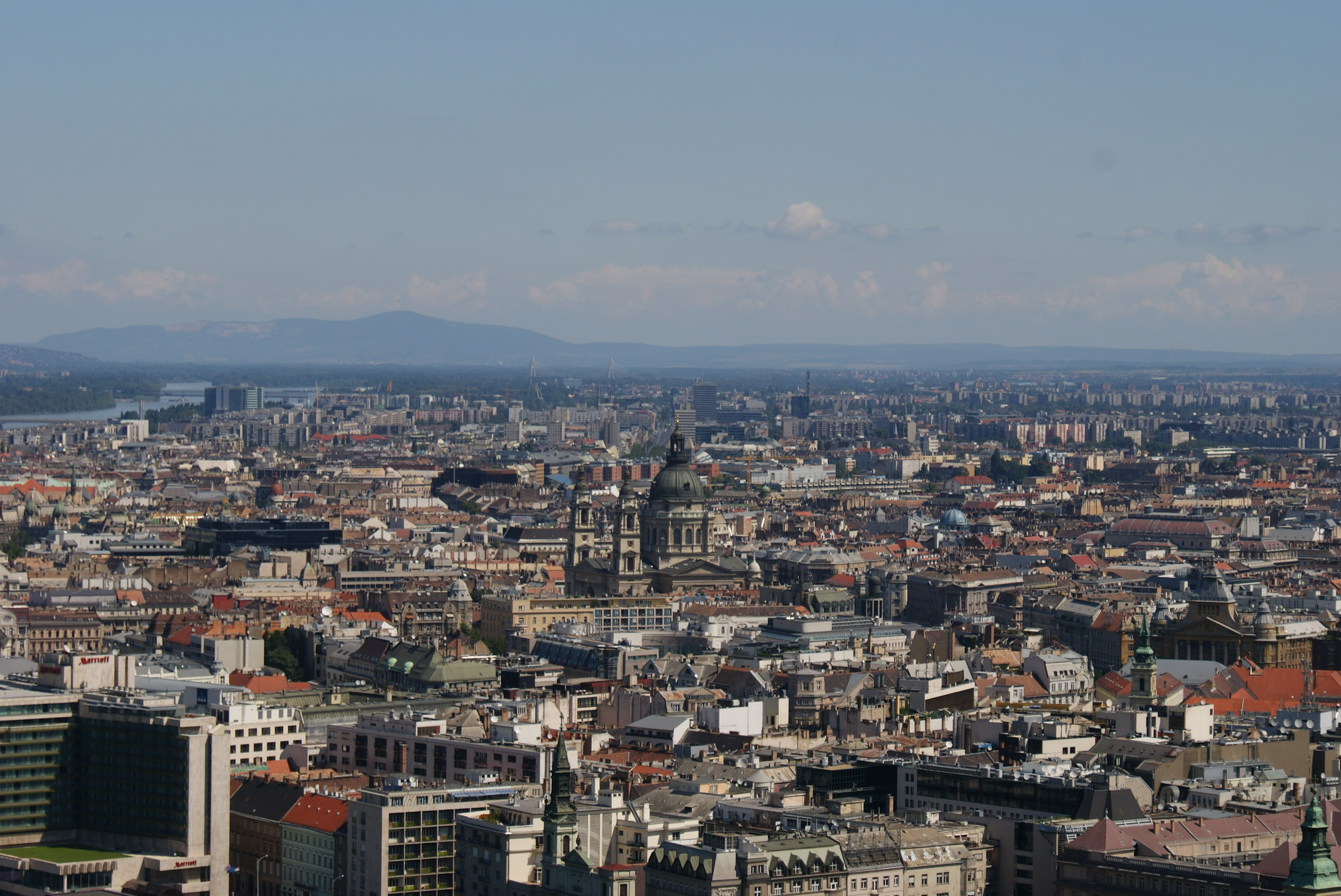 Panorama z Góry Gellerta